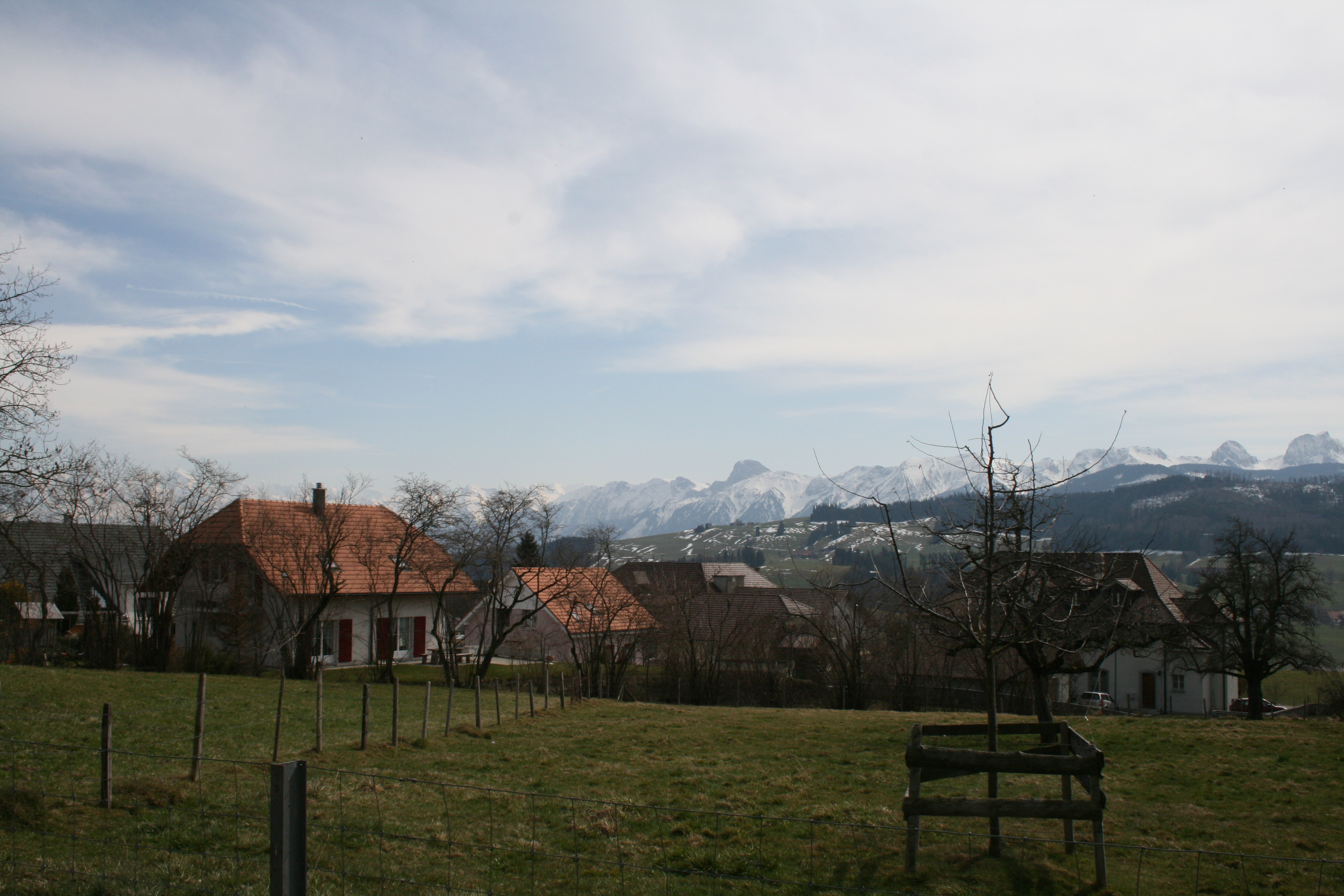 Rüeggisberg